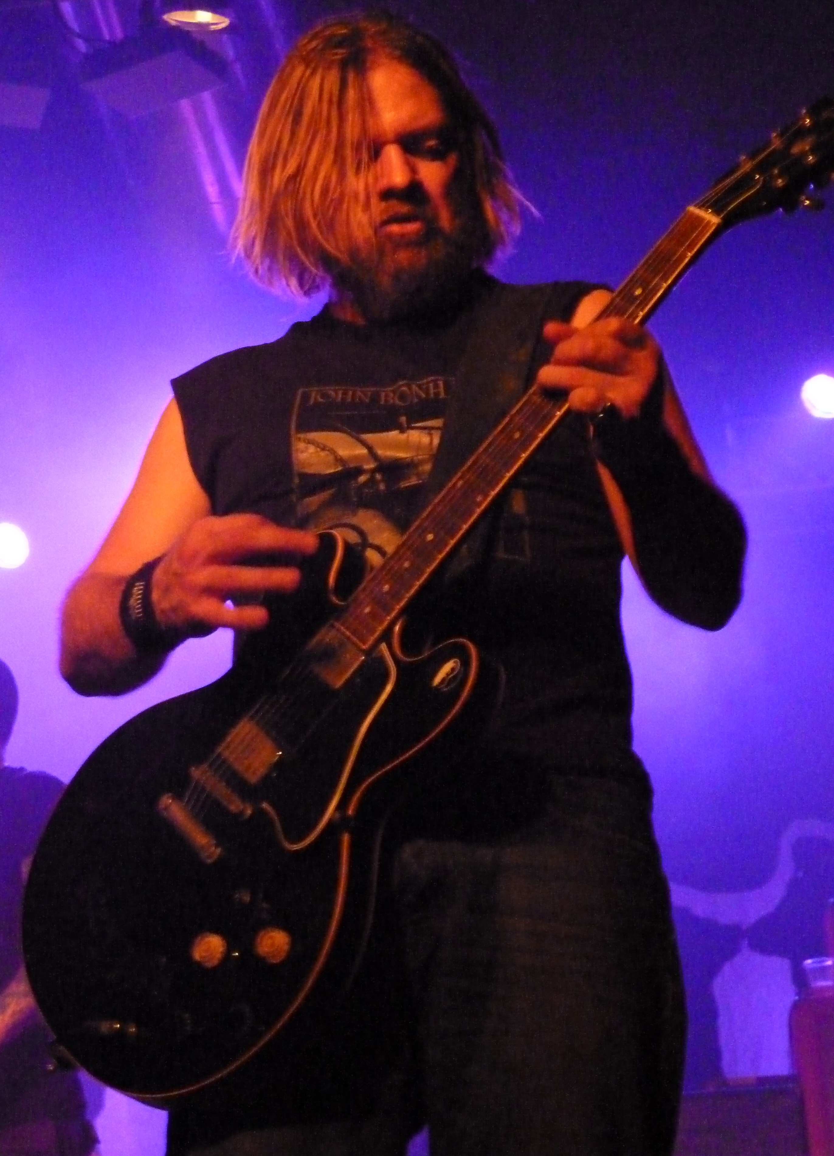 Il chitarrista dei Down Pepper Keenan in concerto ai Magazzini Generali a Milano.